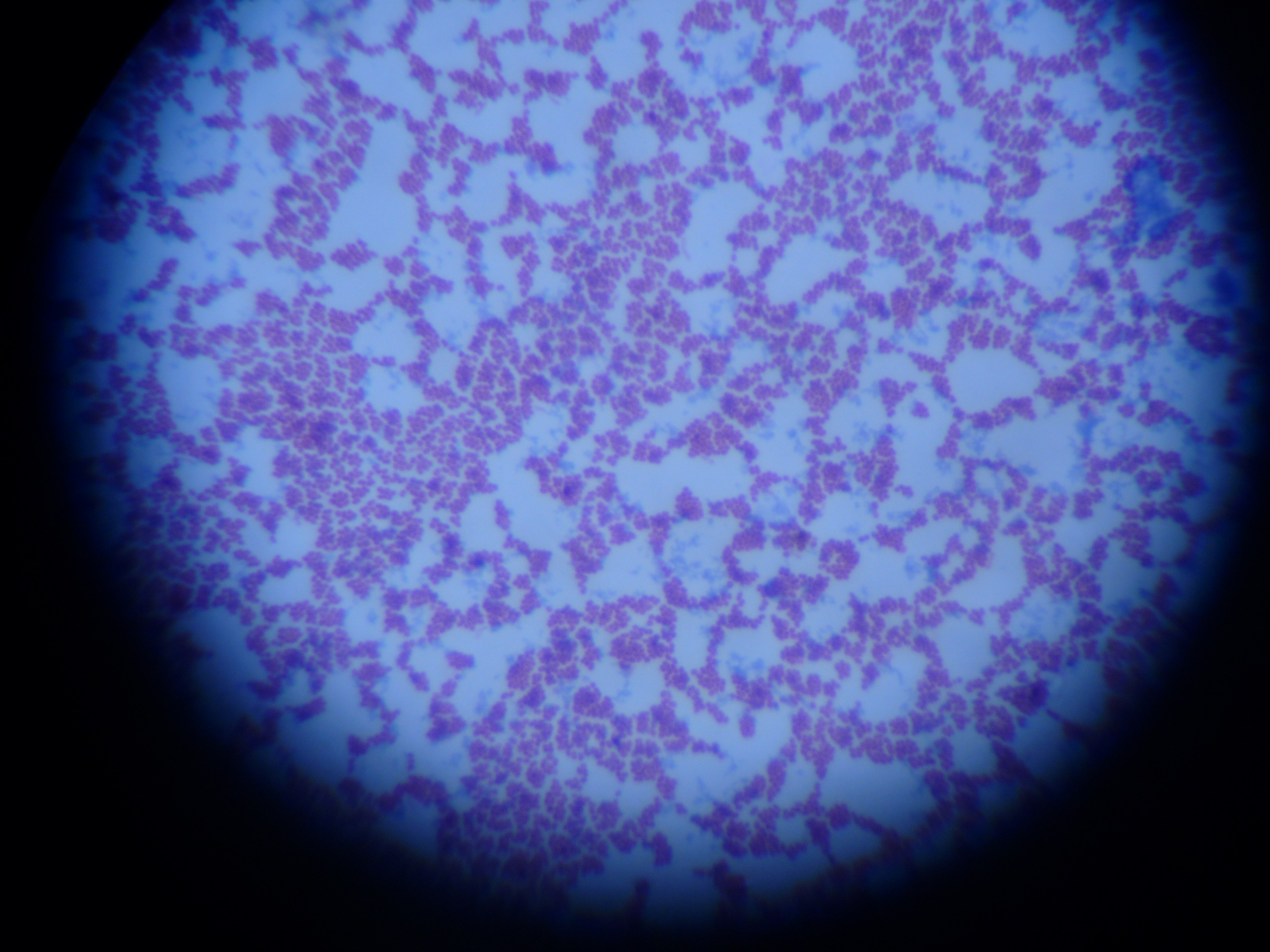 gambaran coccus-ungu pada SGB